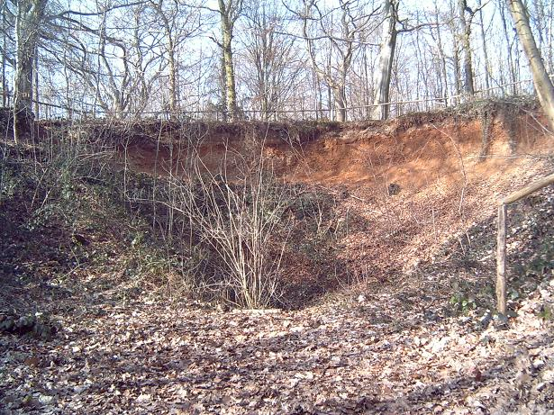 Limburgs: Kiezelkoel in de Savelsbösj